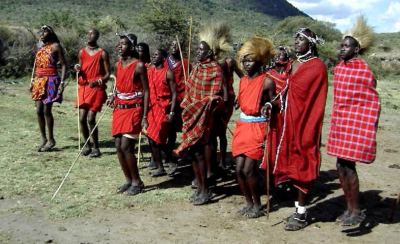 Traditionelle Tänze der Massai, Masai Mara